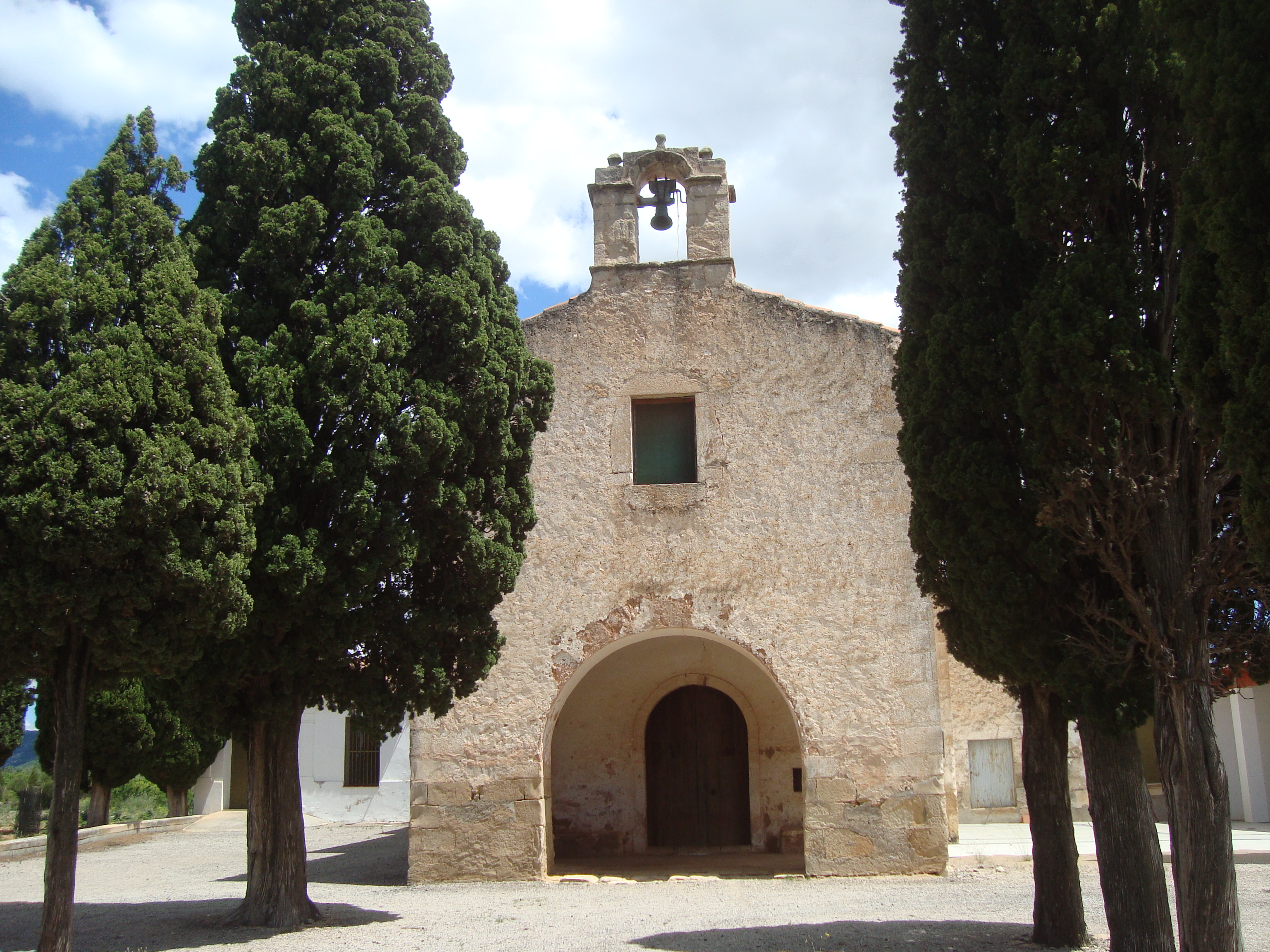 Ermita de Sant Gregori (Atzeneta del Maestrat) 04.001-002.